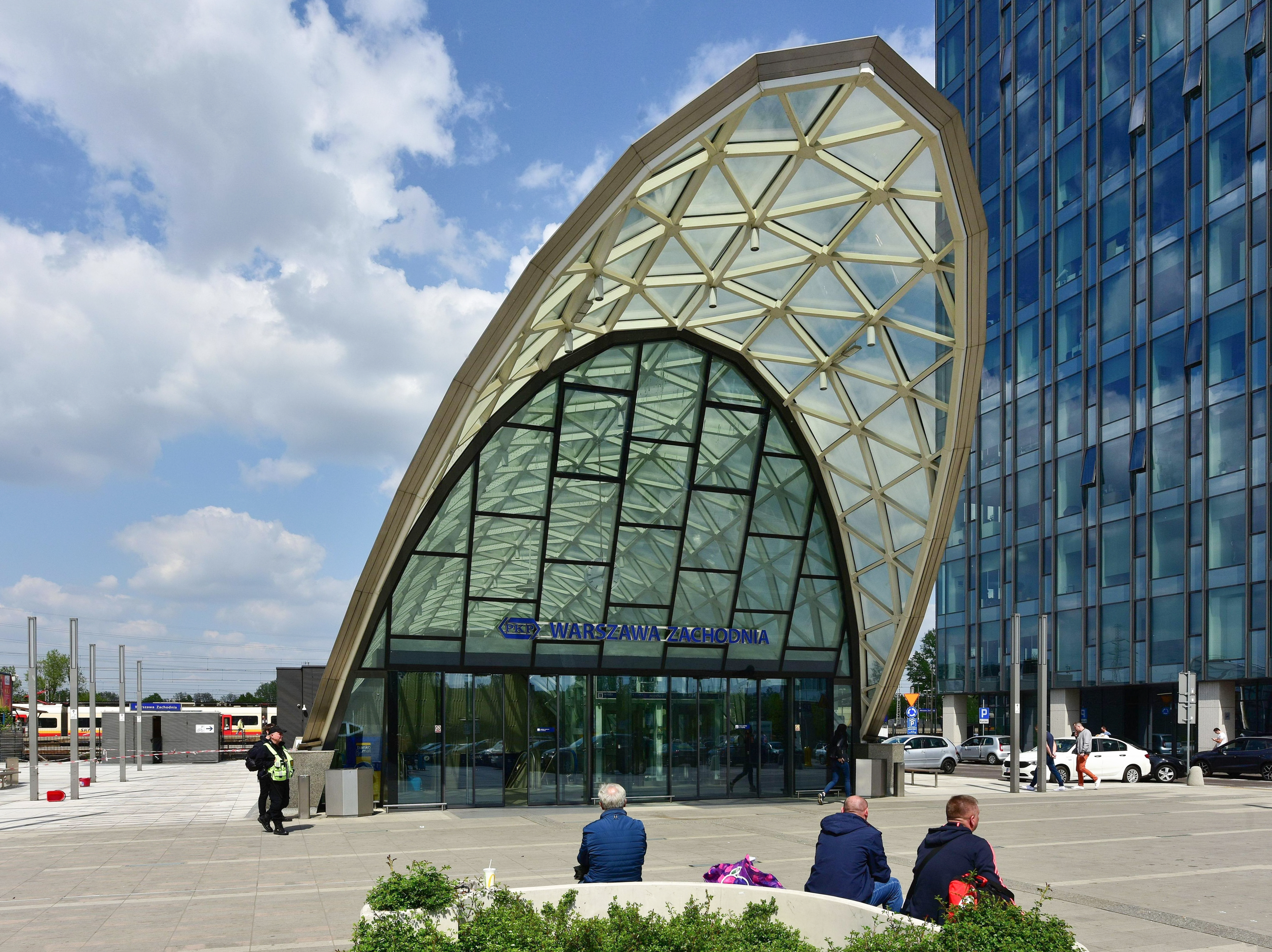 Wejście na dworzec Warszawa Zachodnia od strony Alej Jerozolimskich